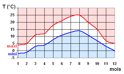 diagramme de la température moyenne mois par mois pour le Territoire de Belfort. Tracé par F5ZV le 7/3/2006 à partir des données de Météo-France